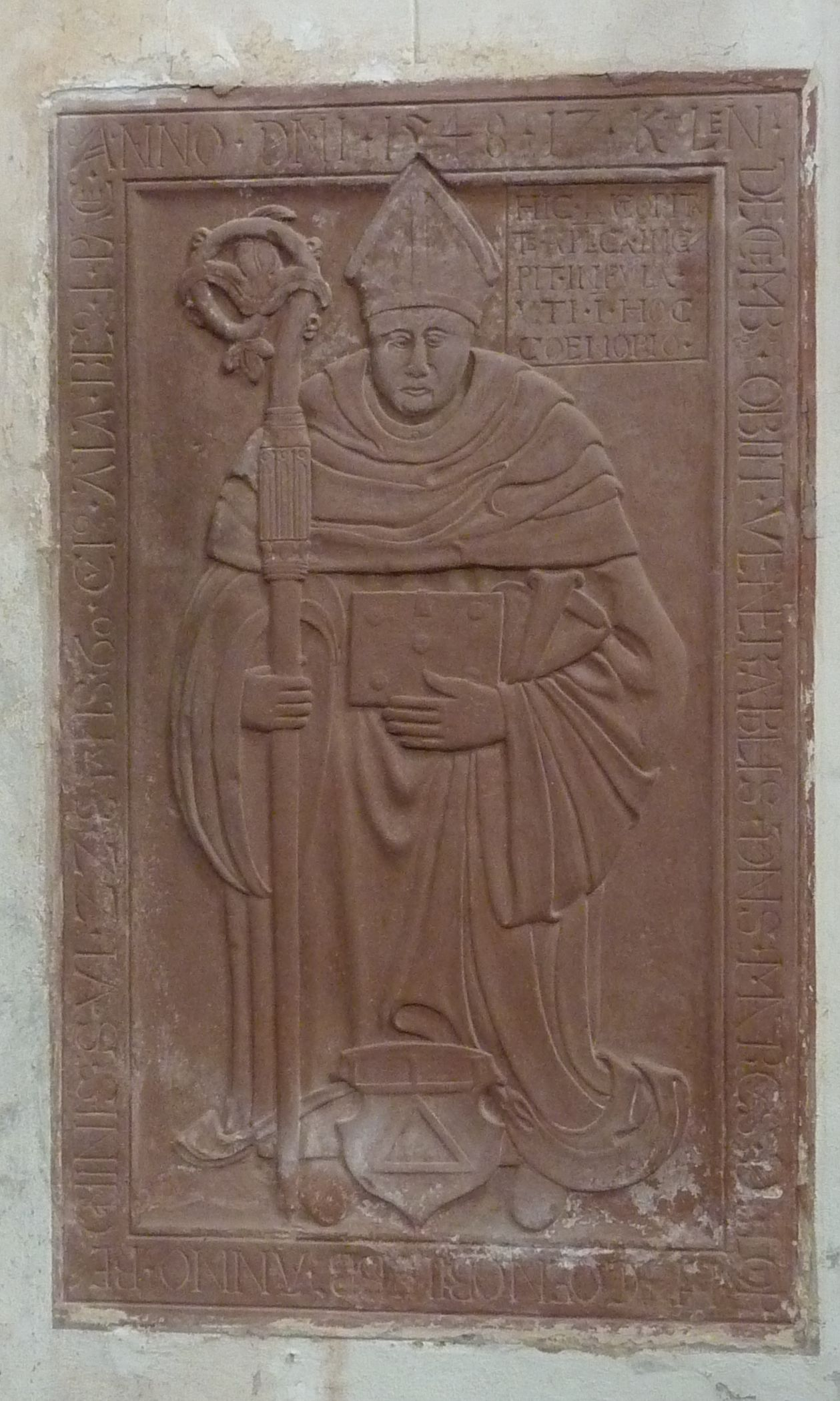 Epitaph in der Klosterkirche Bronnbach